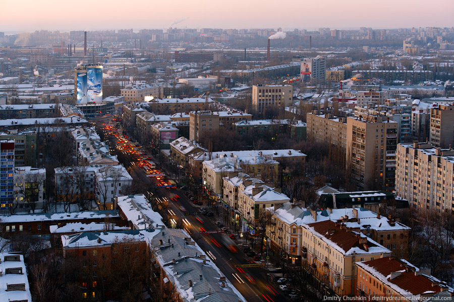 Плехановска улица в сторону Заставы